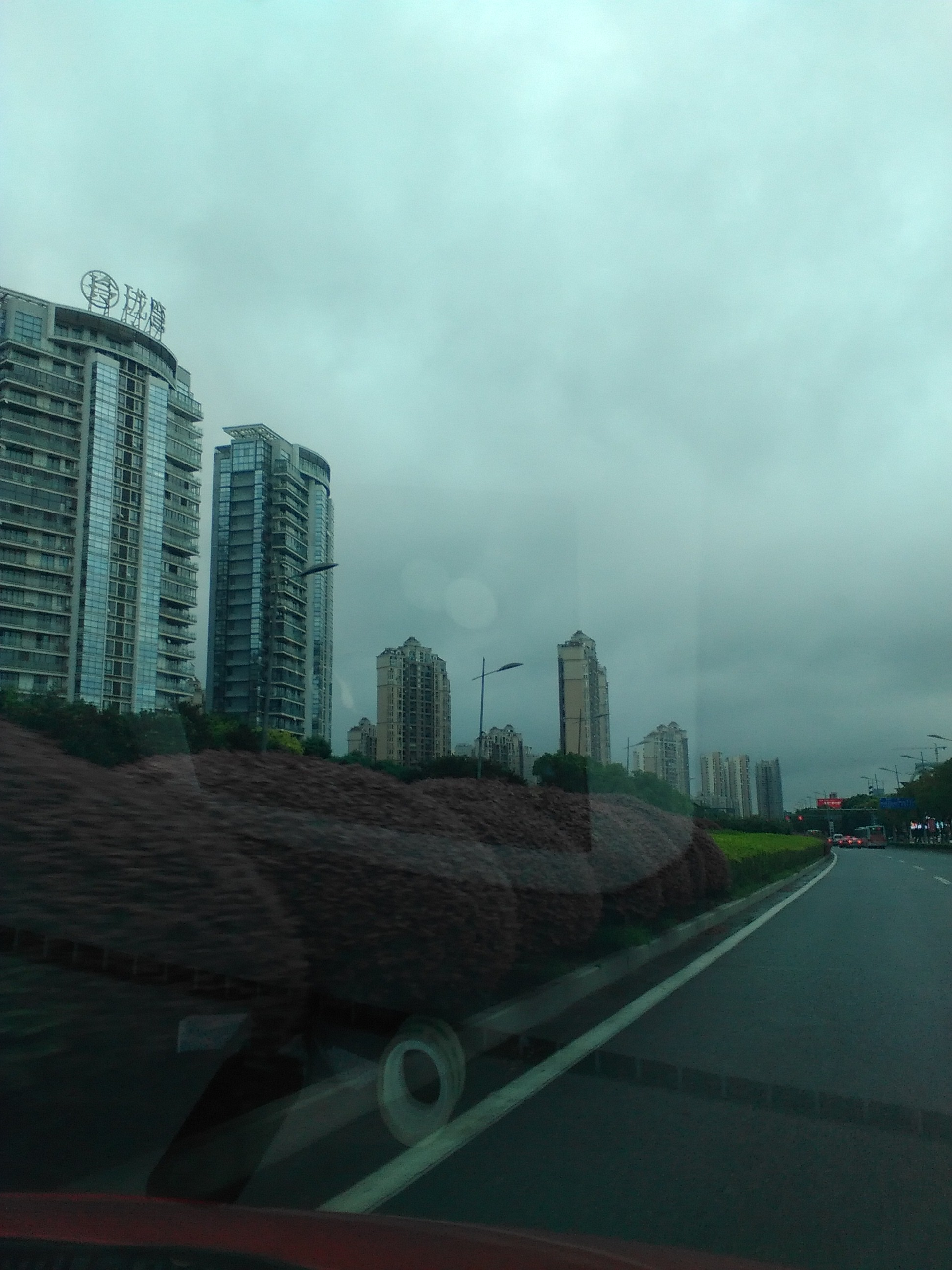 万科在苏州开发的玲珑湾项目